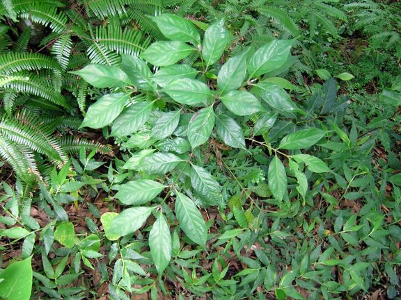 琉球雞屎樹